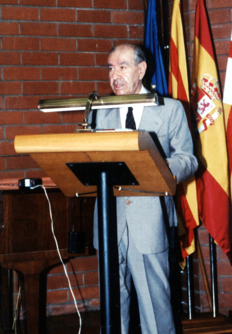 Francesc Español Coll al Congrés Internacional de Coleopterologia de Barcelona, Setembre de 1989